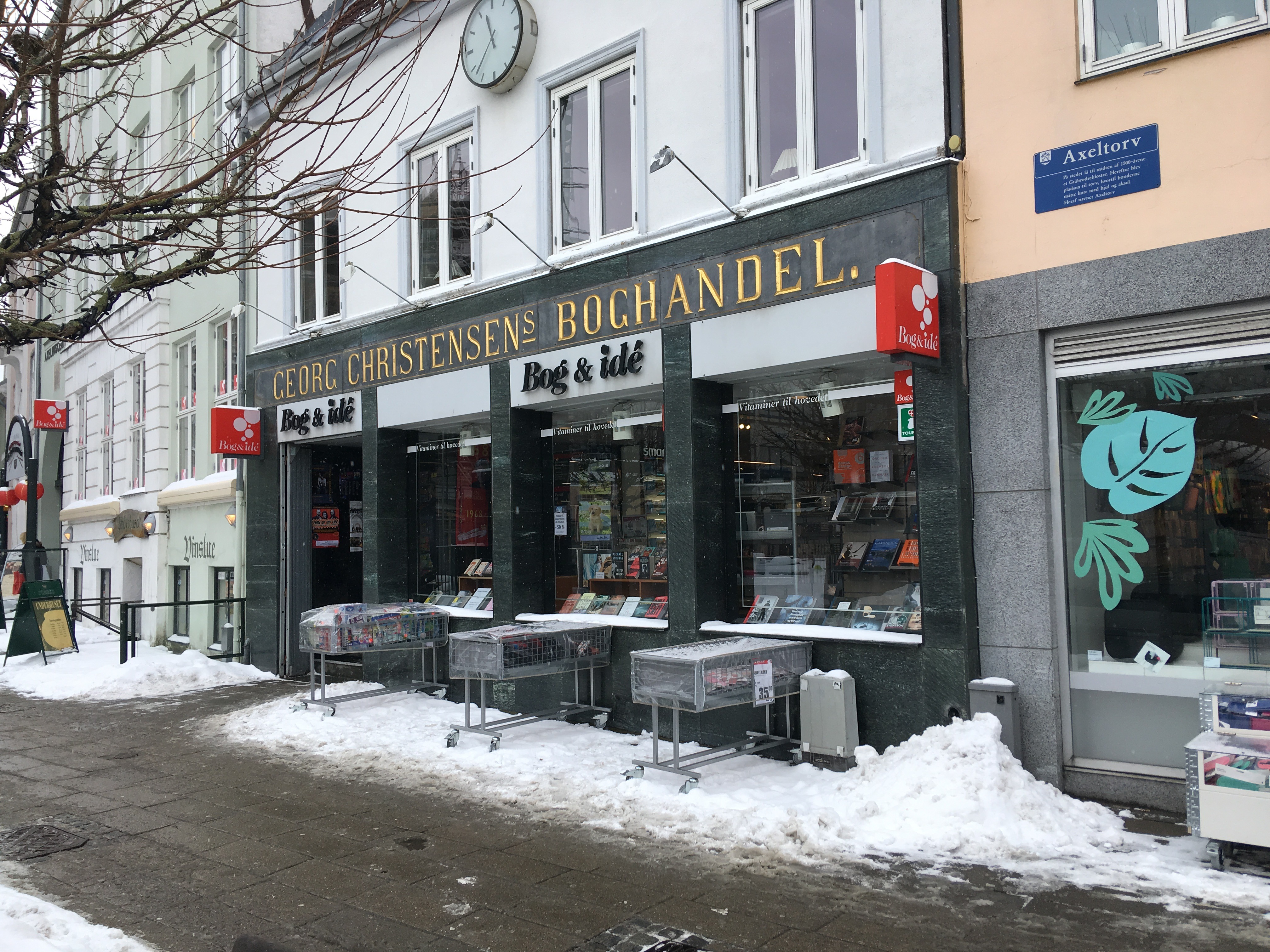 Grundlagt i 1851